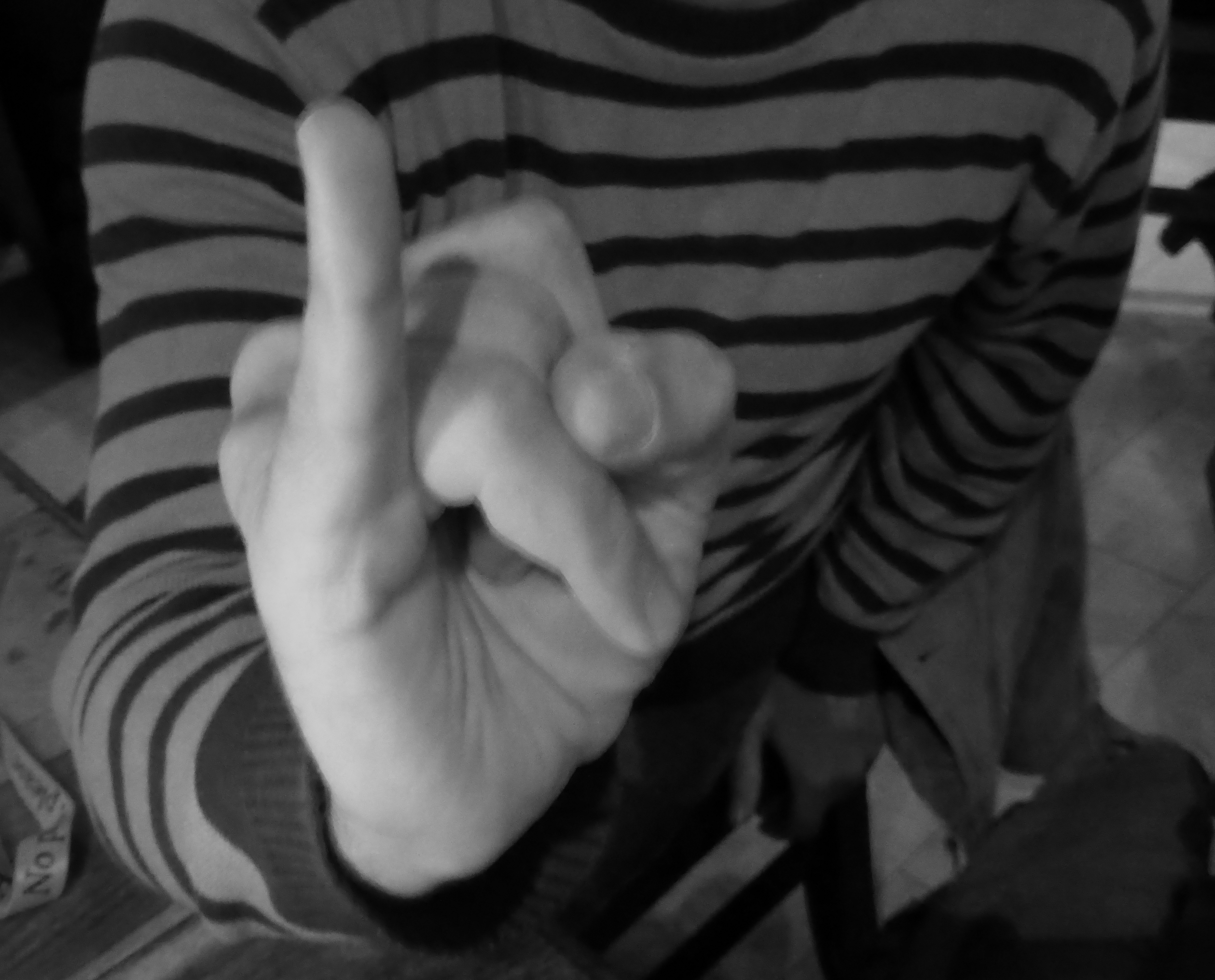 Klenkes von Ahoerstemeier